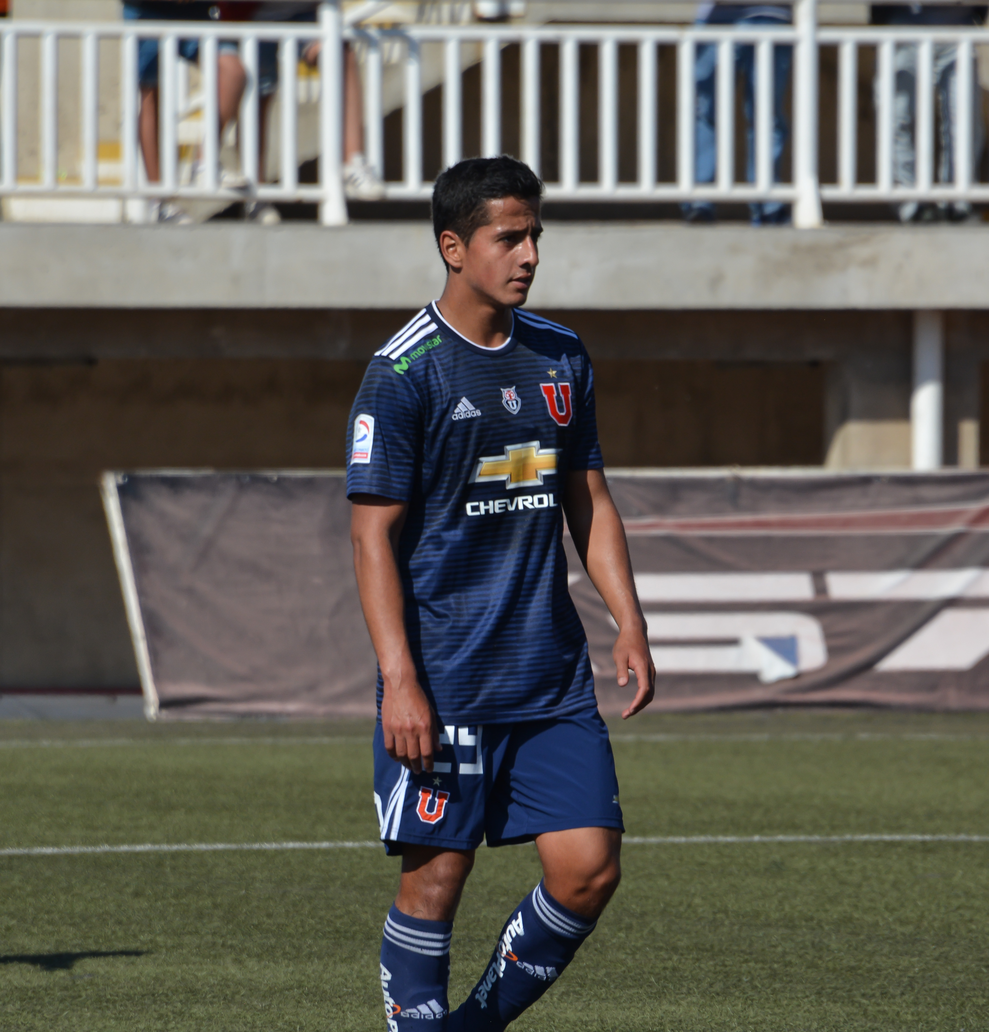 Unión La Calera v Universidad de Chile, Estadio Municipal Lucio Fariña Fernández, Quillota, Chile.